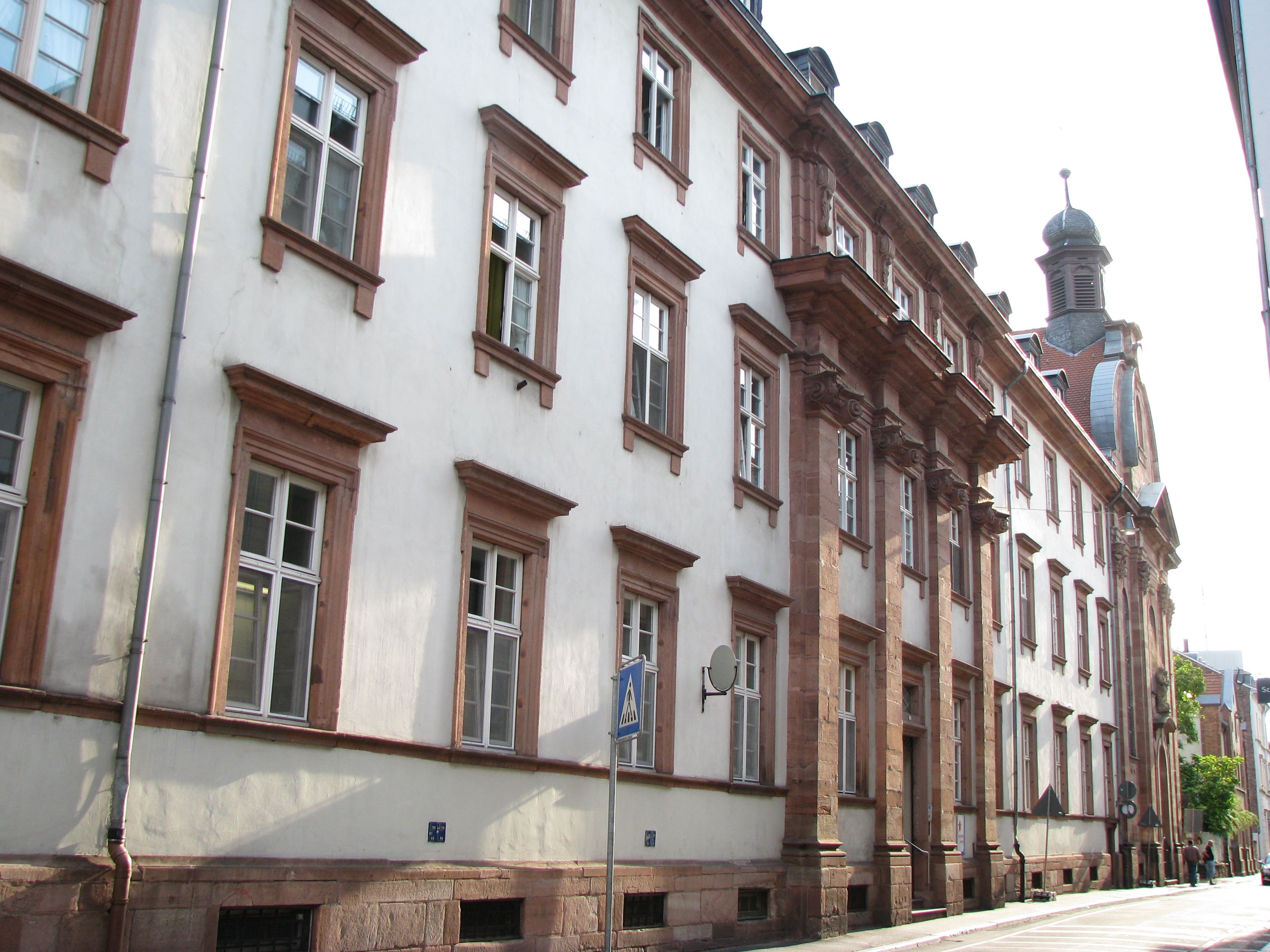 Das ehemalige St.-Anna-Hospital in der Plöck, Heidelberg